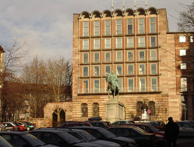 Nürnberg, ehemaliges Pellerhaus (Erdgeschoss), moderne Südfassade (bis 2012 Stadtbibliothek und Stadtarchiv sowie Zweigstelle der Univ.-Bibliothek Erlangen-Nürnberg) und Pkw-Stadtparkplatz Egidienplatz, davor Reiterstandbild Wilhelm I., 1905 von Wilhelm von Ruemann